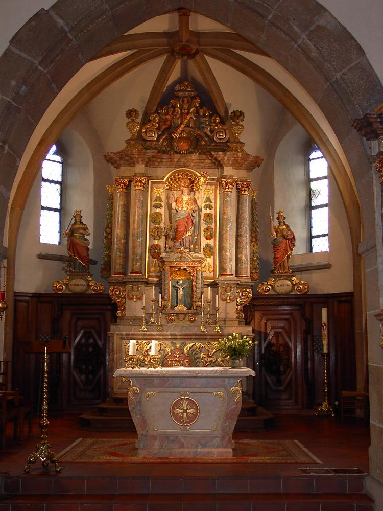 Haupeschkierch zu Munzen: Den Héichaltor an der Munzer Kierch.